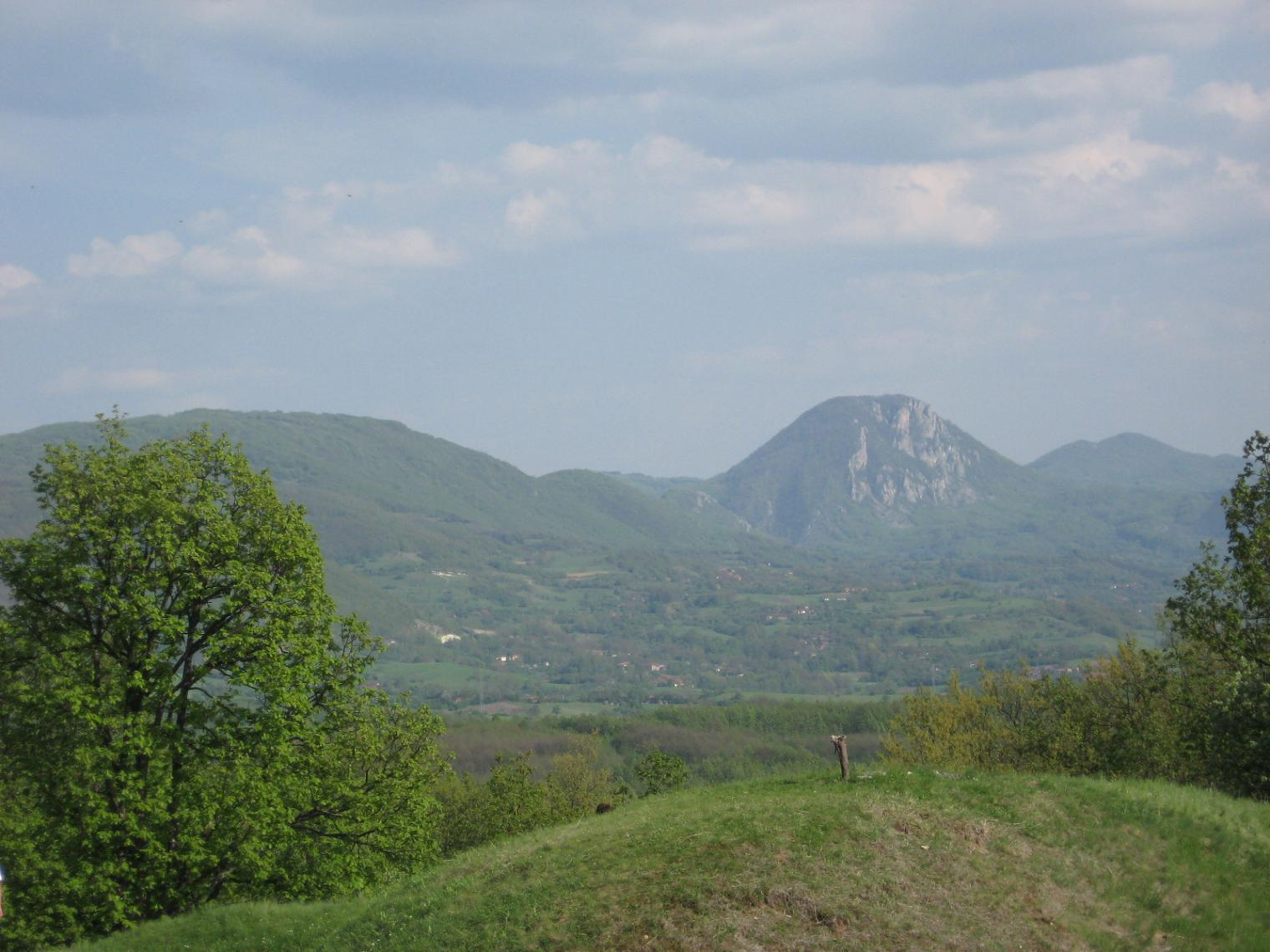 Stolski Kamen, pogled sa brda Šanac. Dragan Cvetković, sopstvena slika.